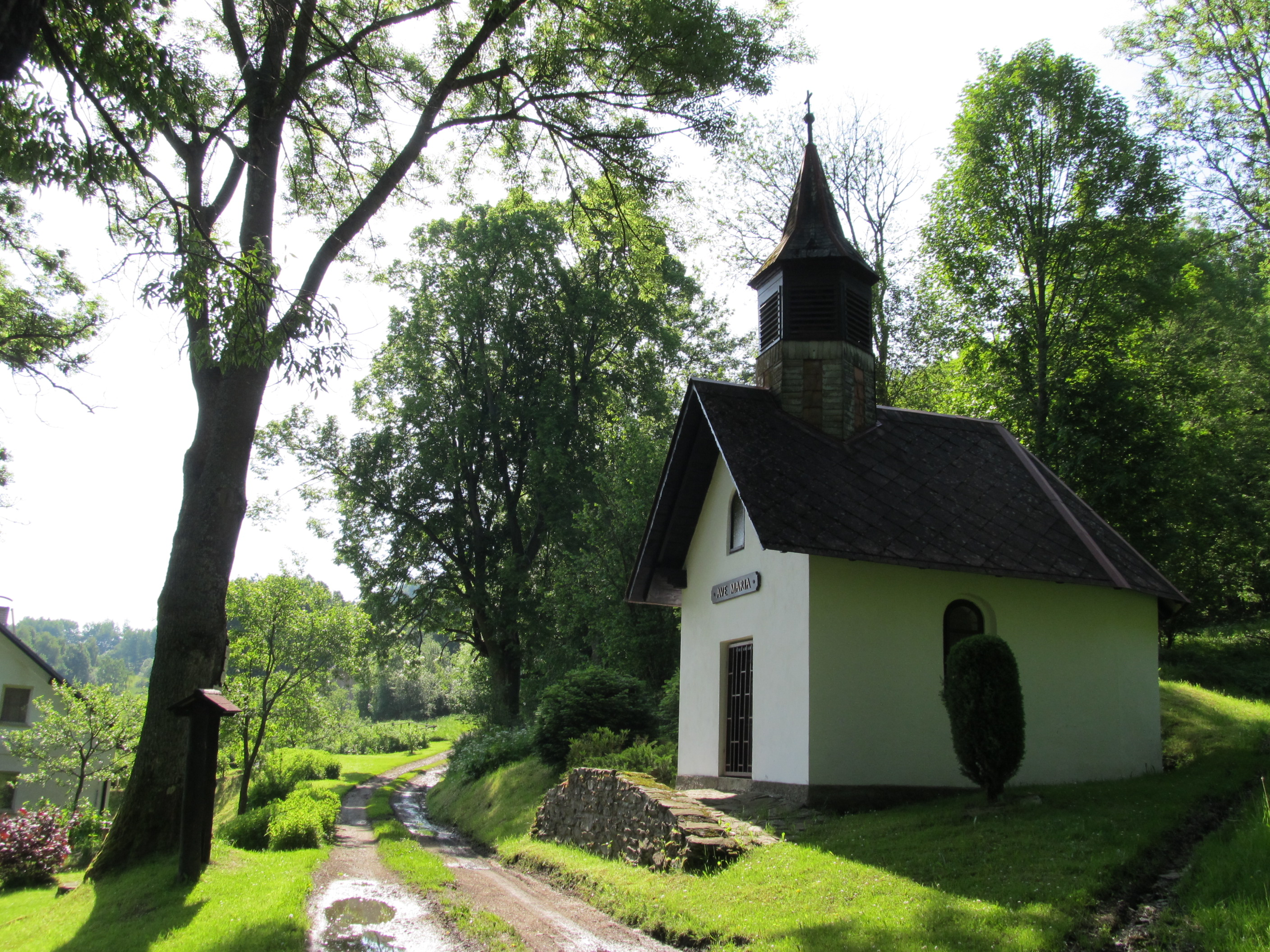 Matějovice - kaple